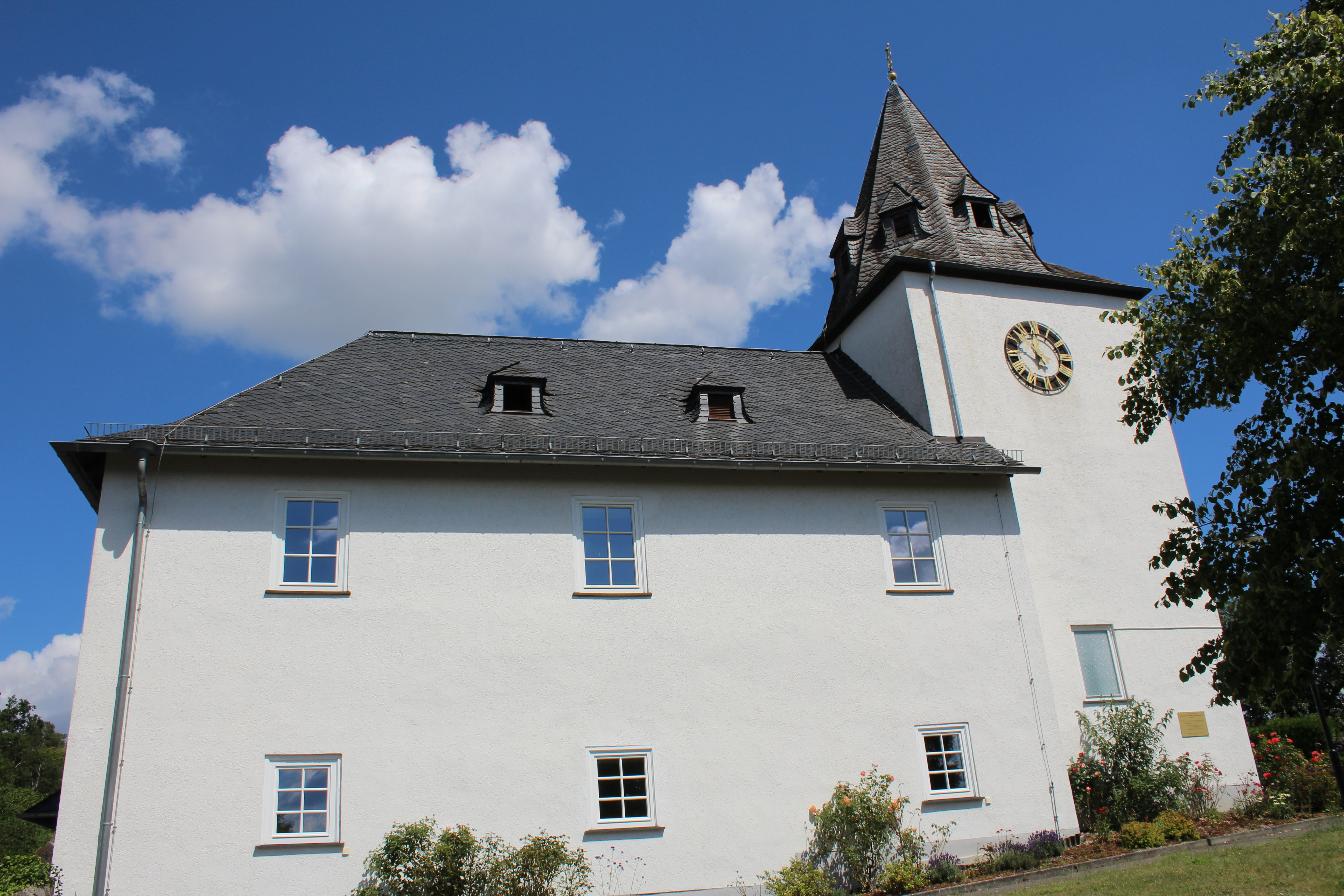 Evangelische Kirche Neukirchen, Braunfels, Lahn-Dill-Kreis, Hessen, Deutschland